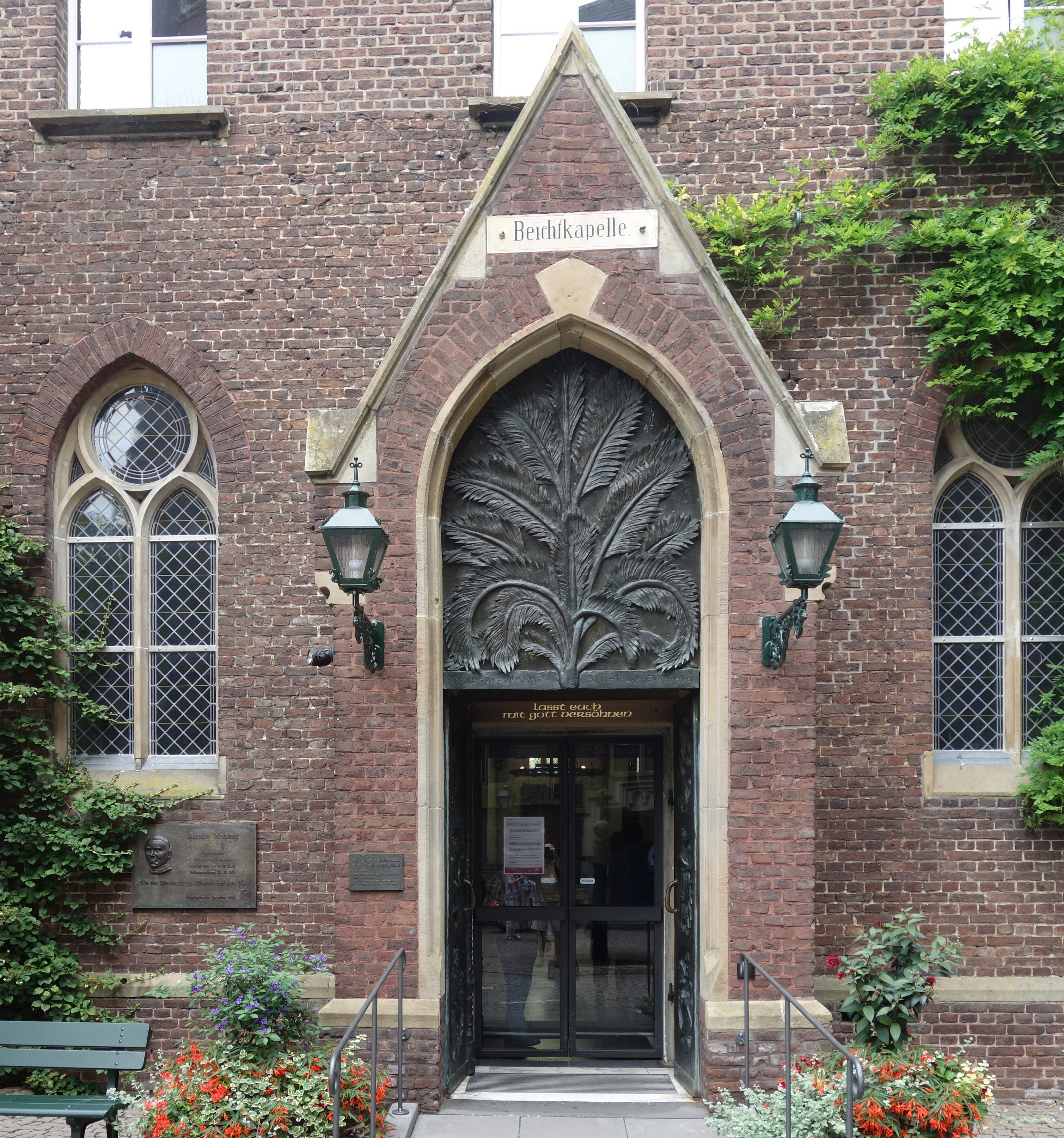 Beichtkapelle in Kevelaer